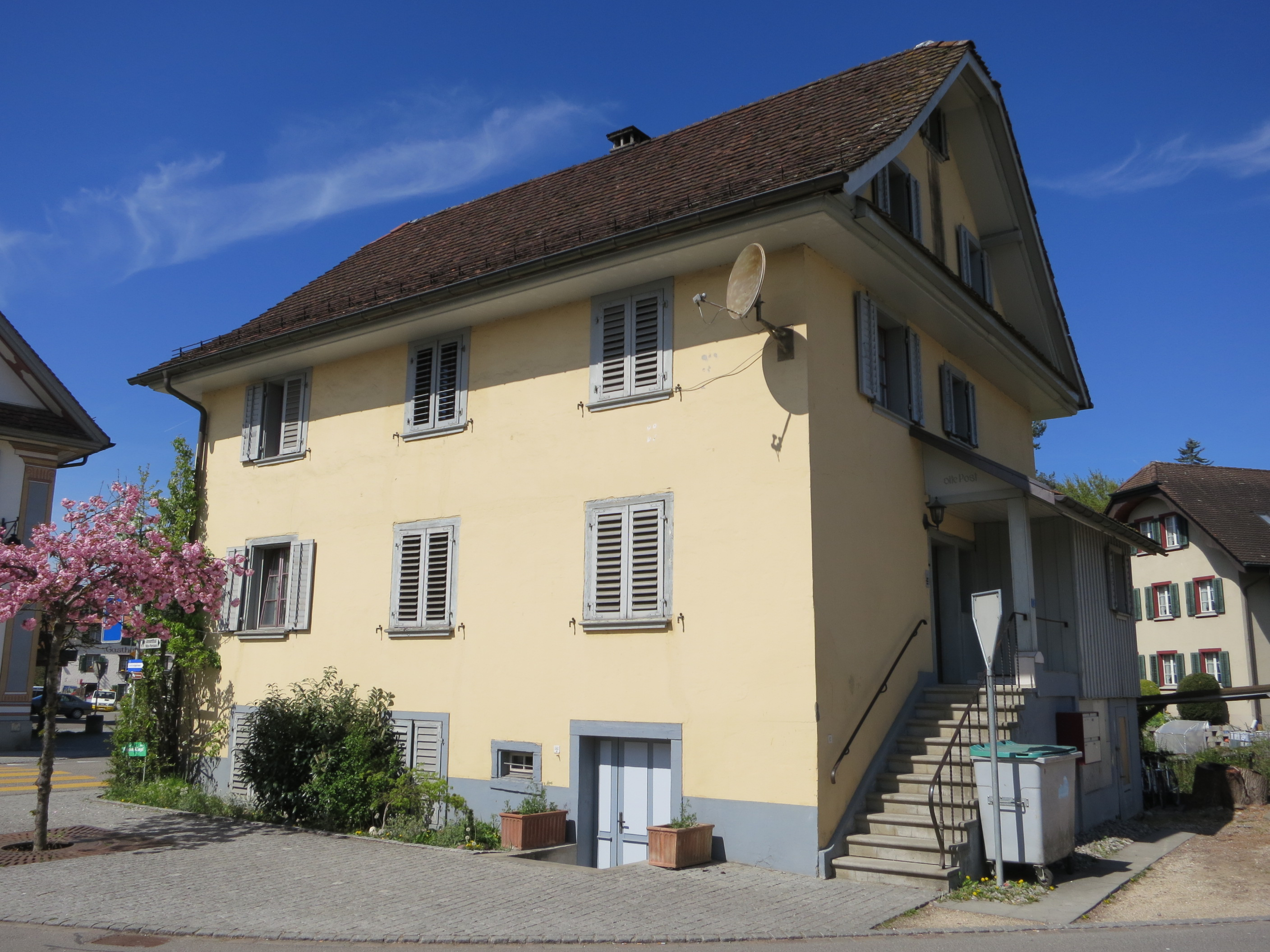 Alte Post, Jonen AG, Schweiz